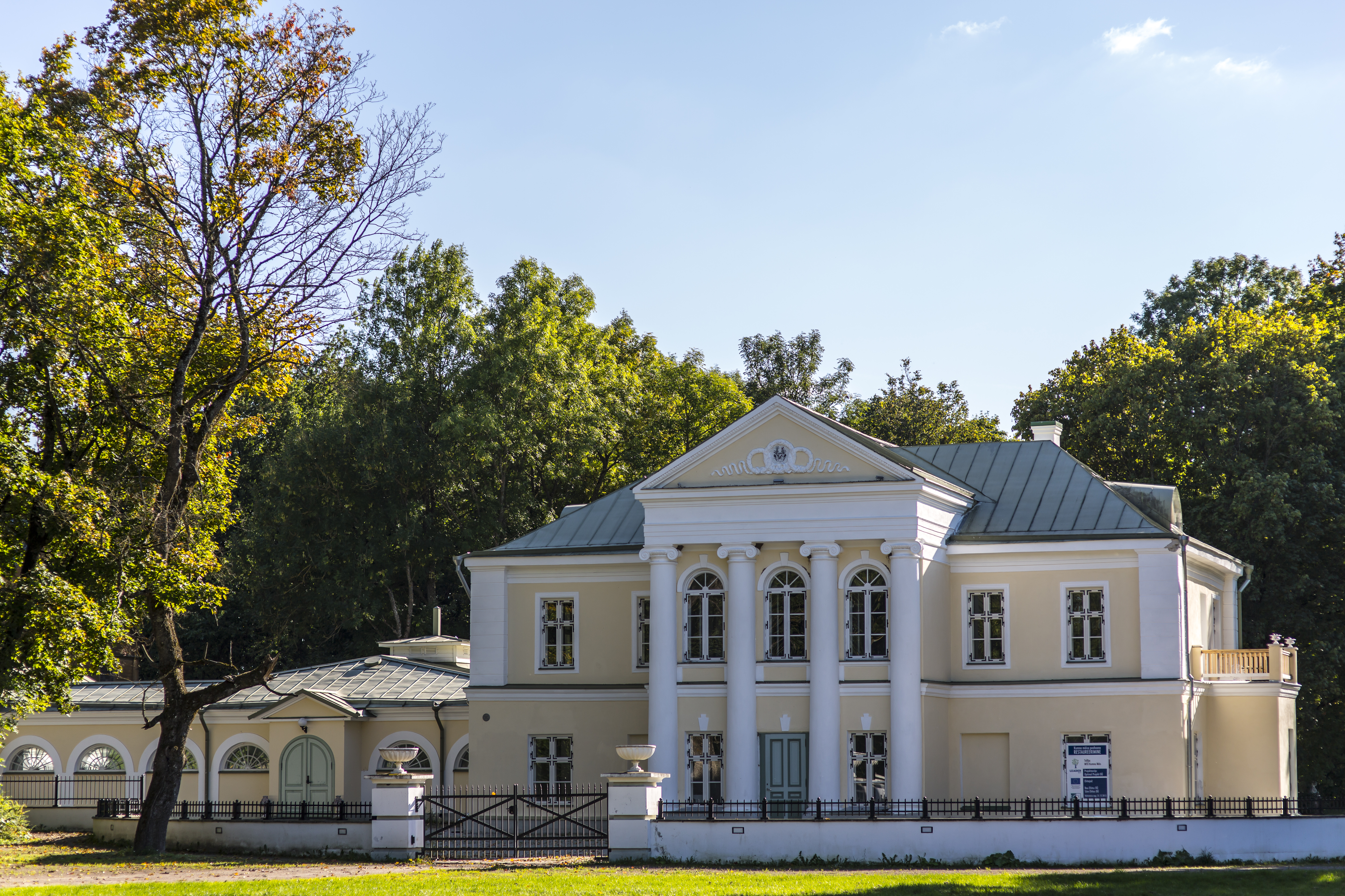 Vana puust peahoone kõrvale (varasema ehitise kohale) ca 1913.a. ehitatud nn. suvemõis. Hoone on neoklassitsistliku arhitektuuriga. Mõis kuulus Mayendorffide perekonnale. Asukoht: Harju maakond, Harku vald, Kumna küla